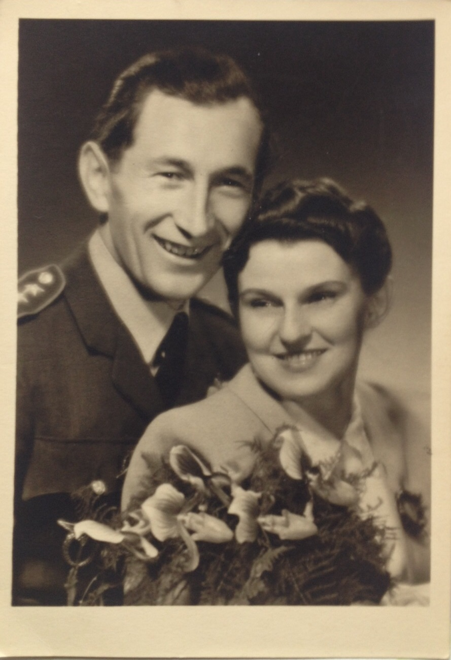 Otto Špaček a jeho první žena